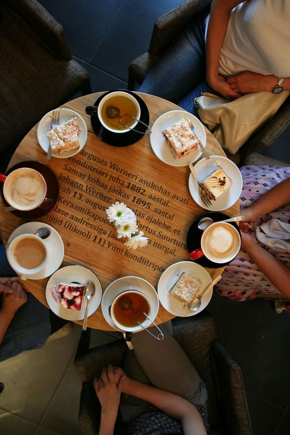 Kohvilaud Werneri kohvikus.